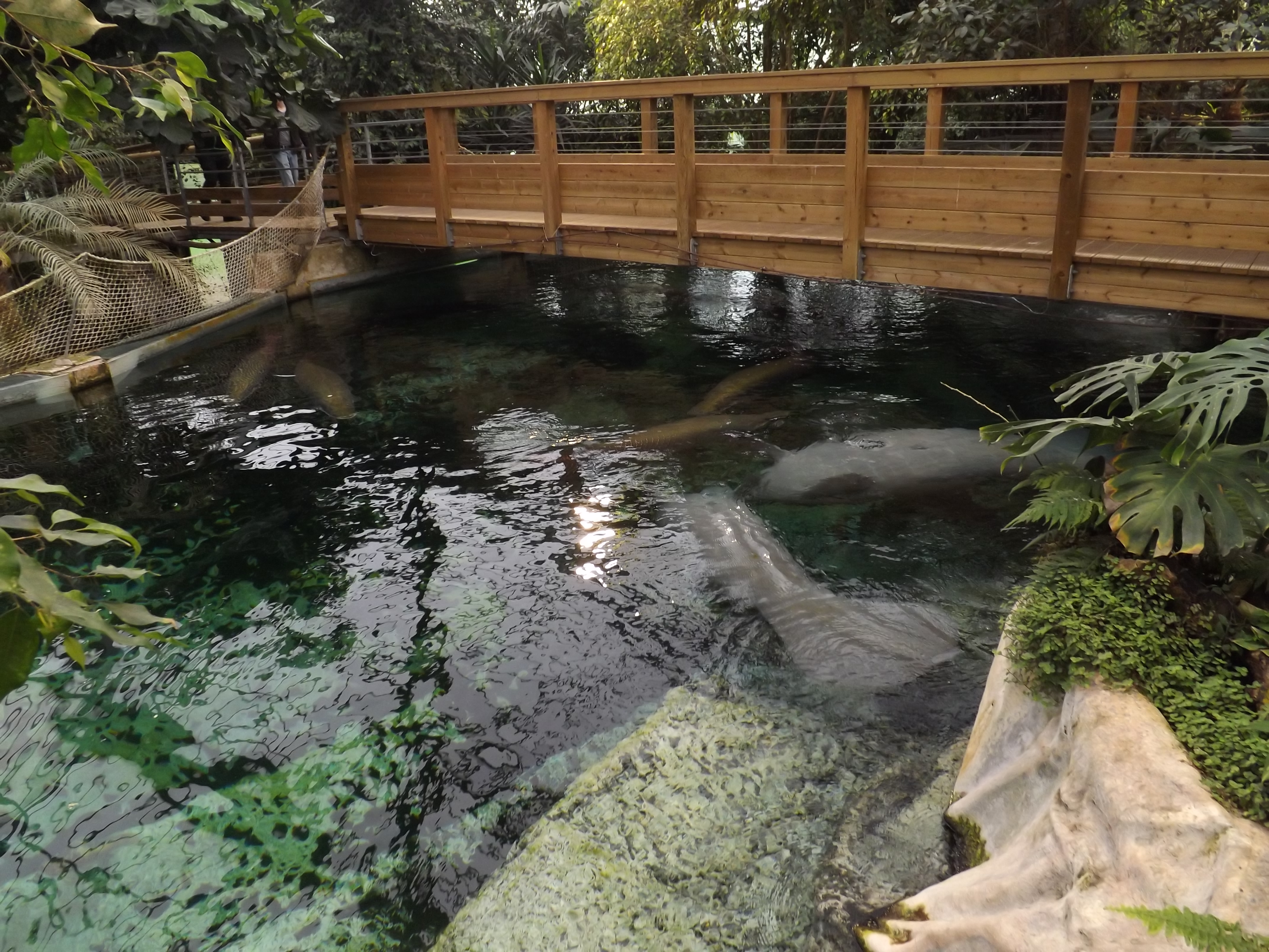 Bassin des lamantins du ZooParc de Beauval